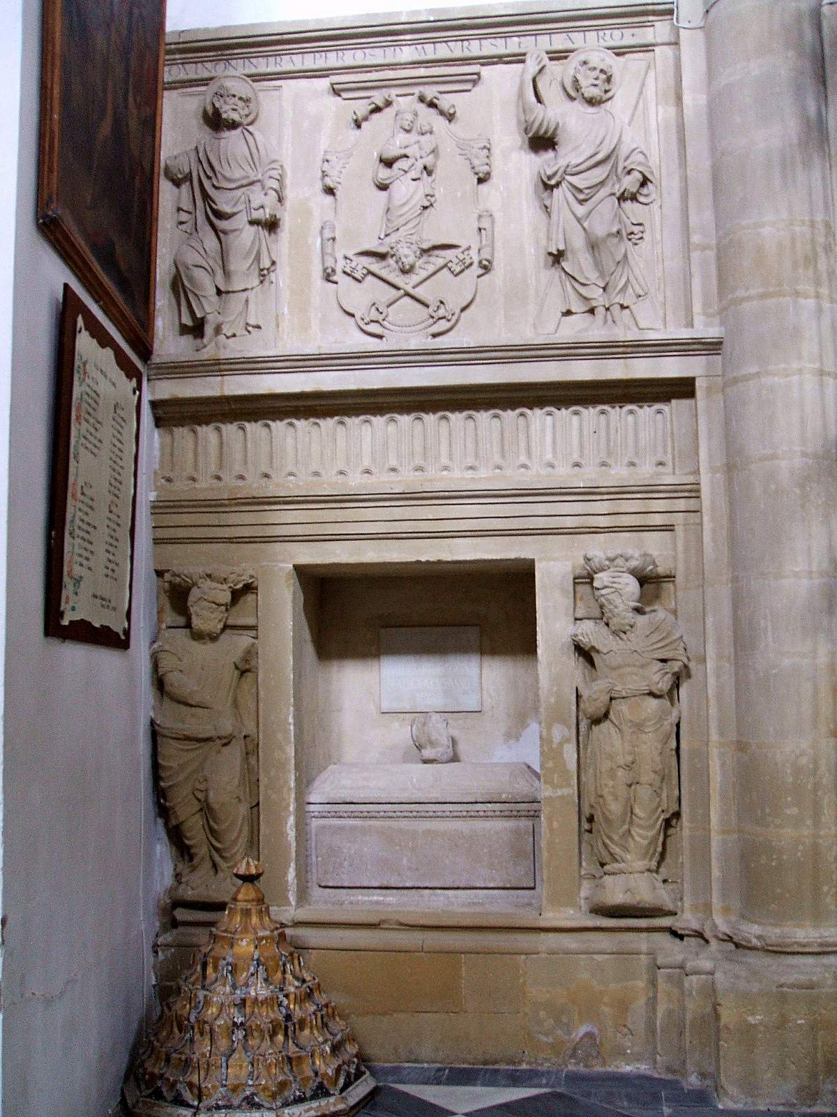 Baeza - Catedral, Sepulcro de Cristobal Lechuga